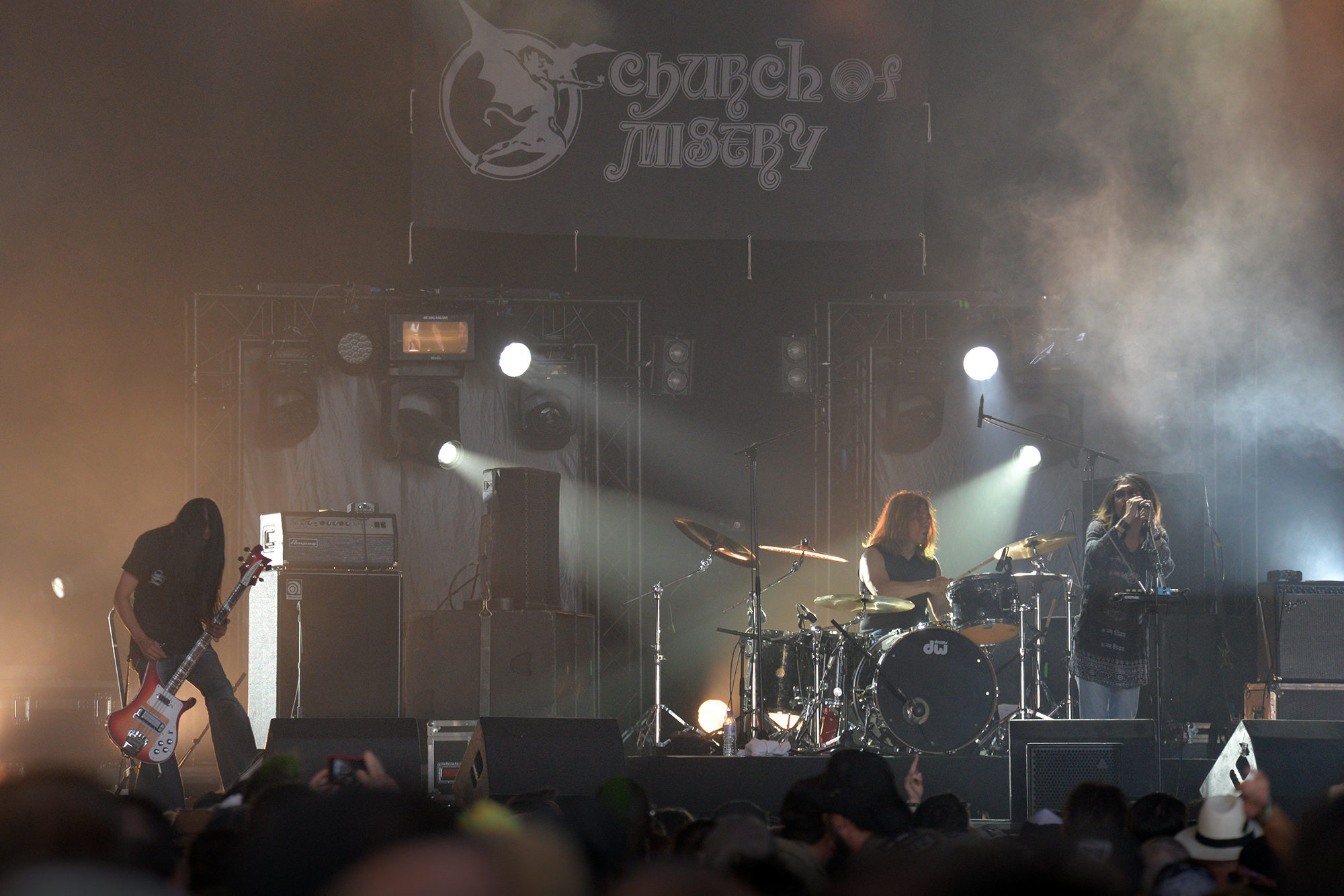 Concert du groupe japonais Church of Misery sur la scène Valley, Hellfest 2018.